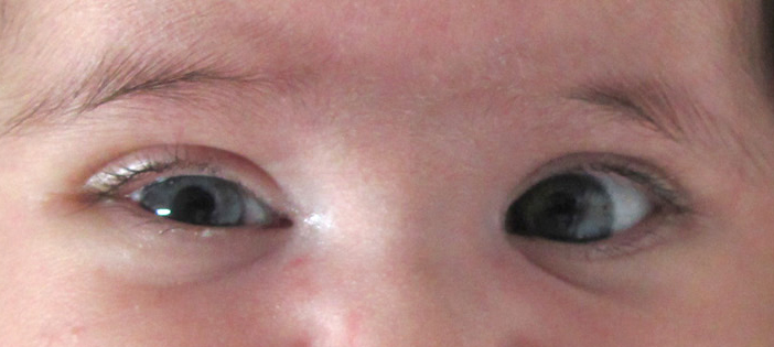 Հորների համախտանիշ աջից՝ աջ բազկահյուսակի ամբողջական կաթվածով 2 ամսական նորածնի մոտ